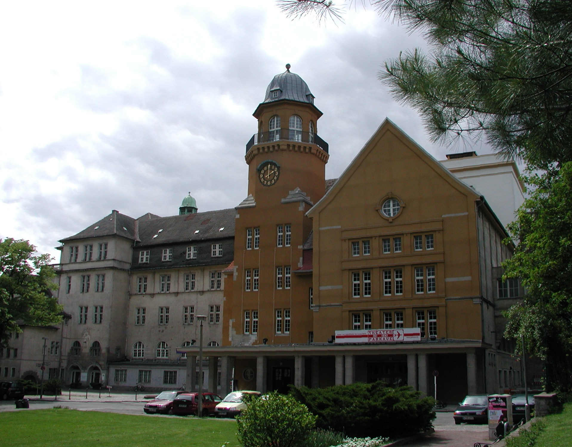 der gesamte ehemalige Schulkomplex an der Parkaue